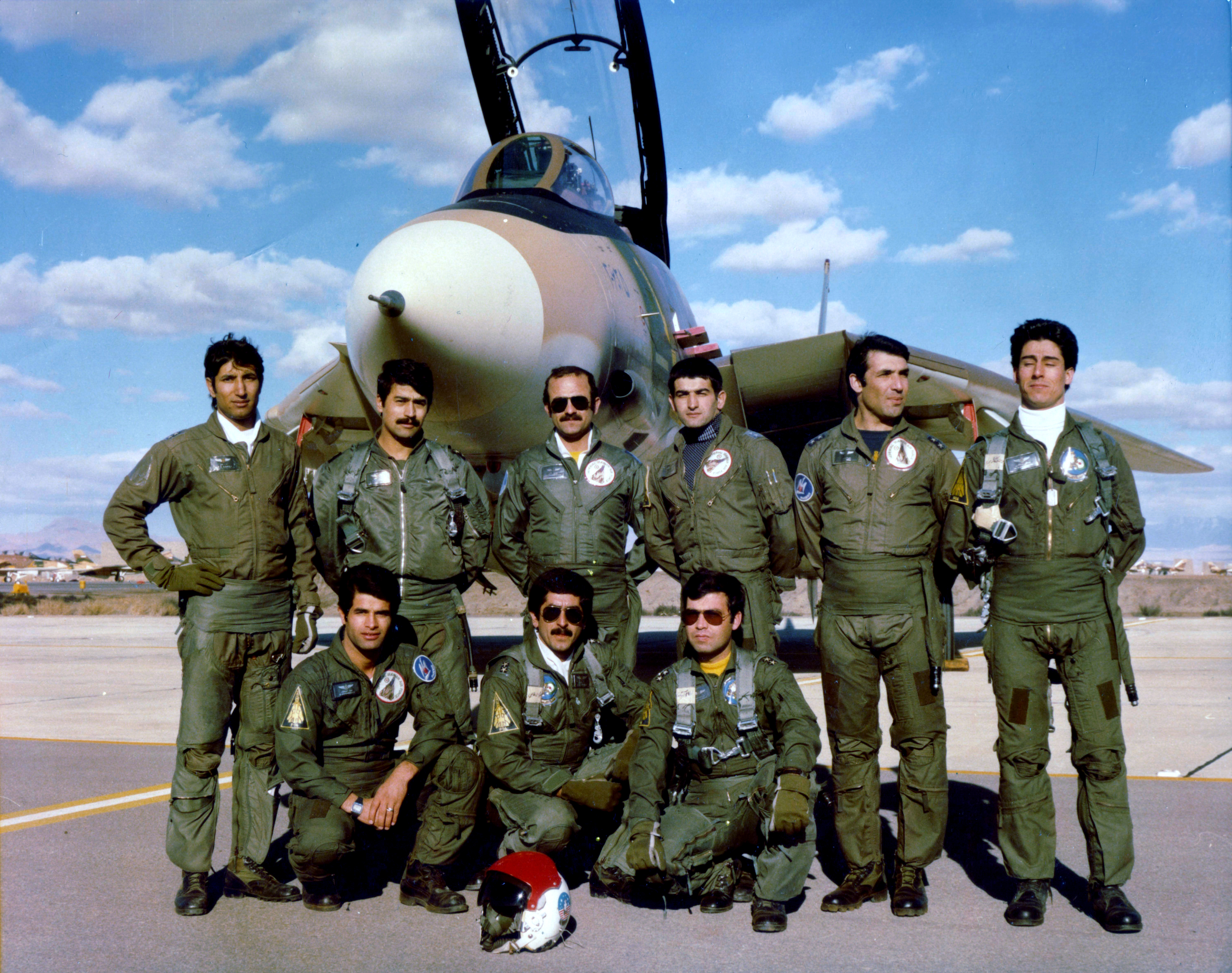 خلبانان جنگنده اف-14: ایستاده از چپ:اسدالله عادلی - جلیل زندی - غلام هاشمپور - عباس بابائی - ایرج سیروس - محمد رستم پور. نشسته از چپ: صدیقیان - احمد مرادی طالبی -اکبر پناهی